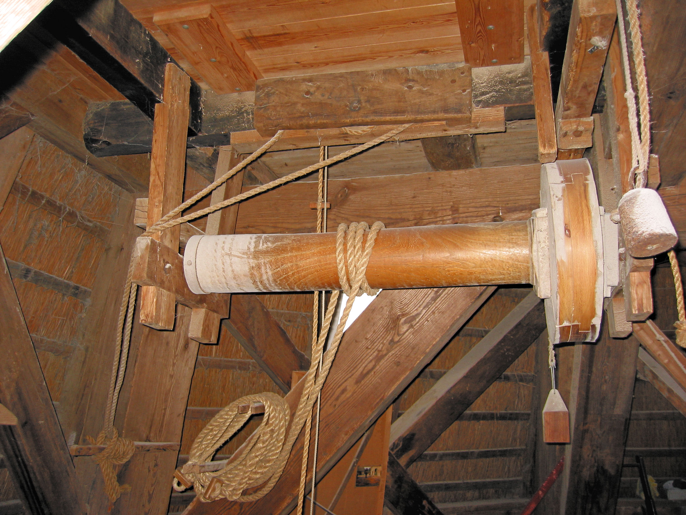 Walderveense molen afschietwerk, Ede, the Netherlands